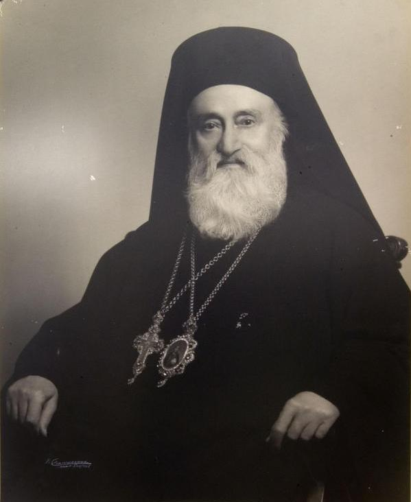 Хрисостомос Хадзиставру